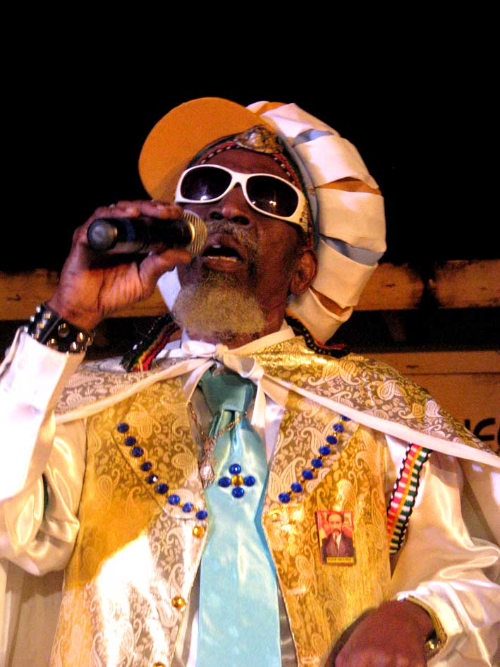 Bunny Wailer, Negril. Foto: Dubdem e FabDub.